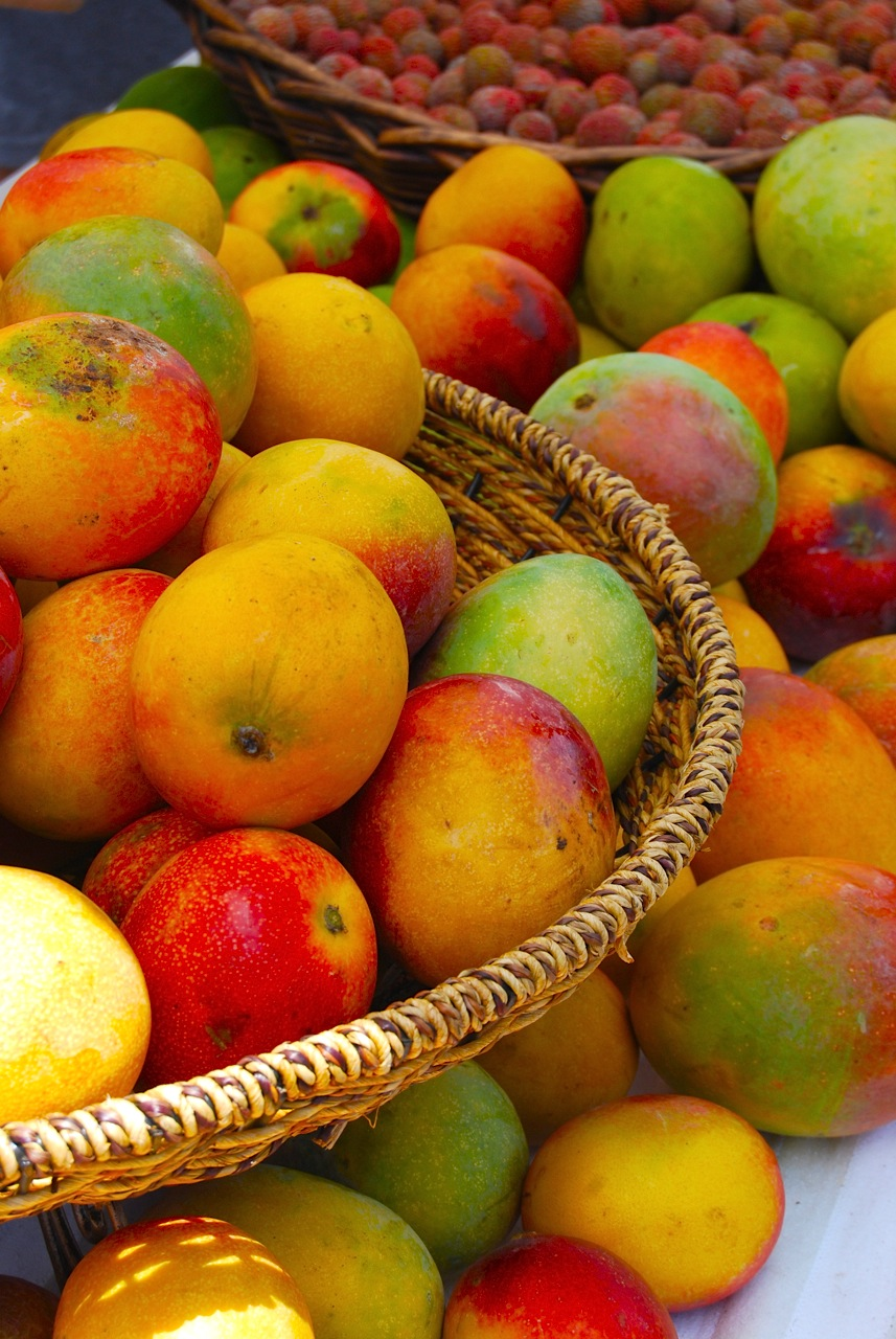 i love you like a mango